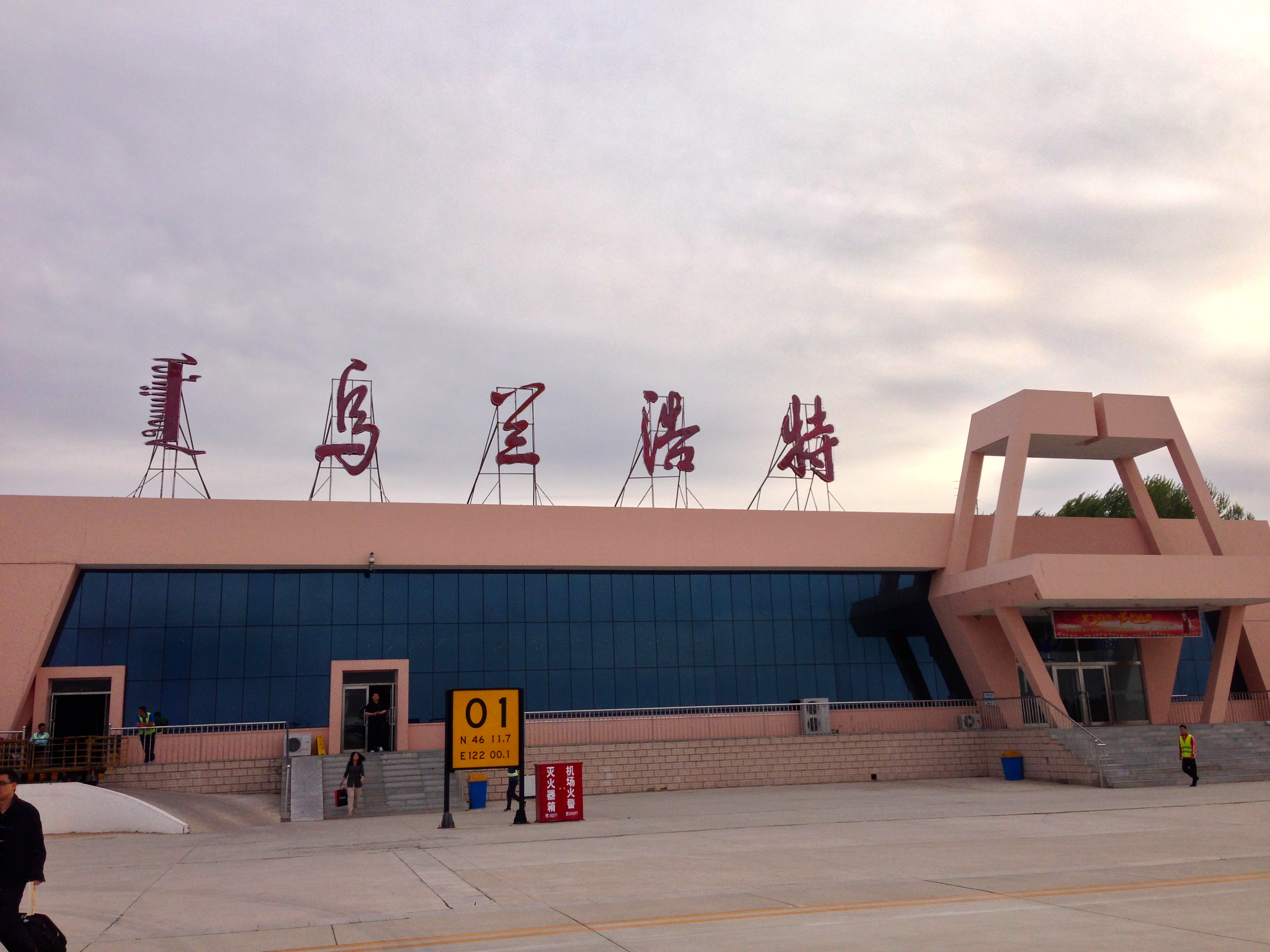 烏蘭浩特機場